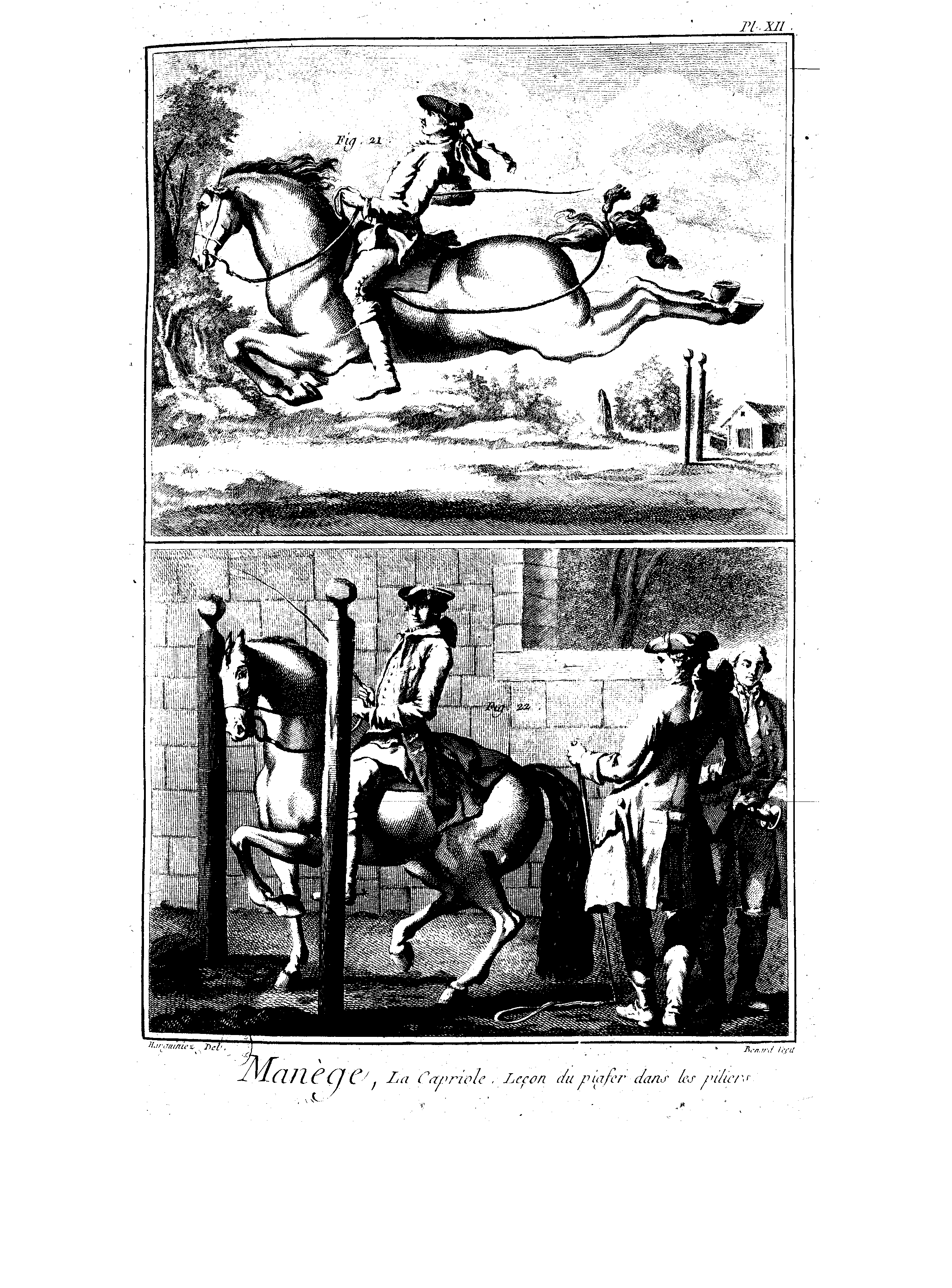 Planches de l'Encyclopédie de Diderot et d'Alembert, volume 6